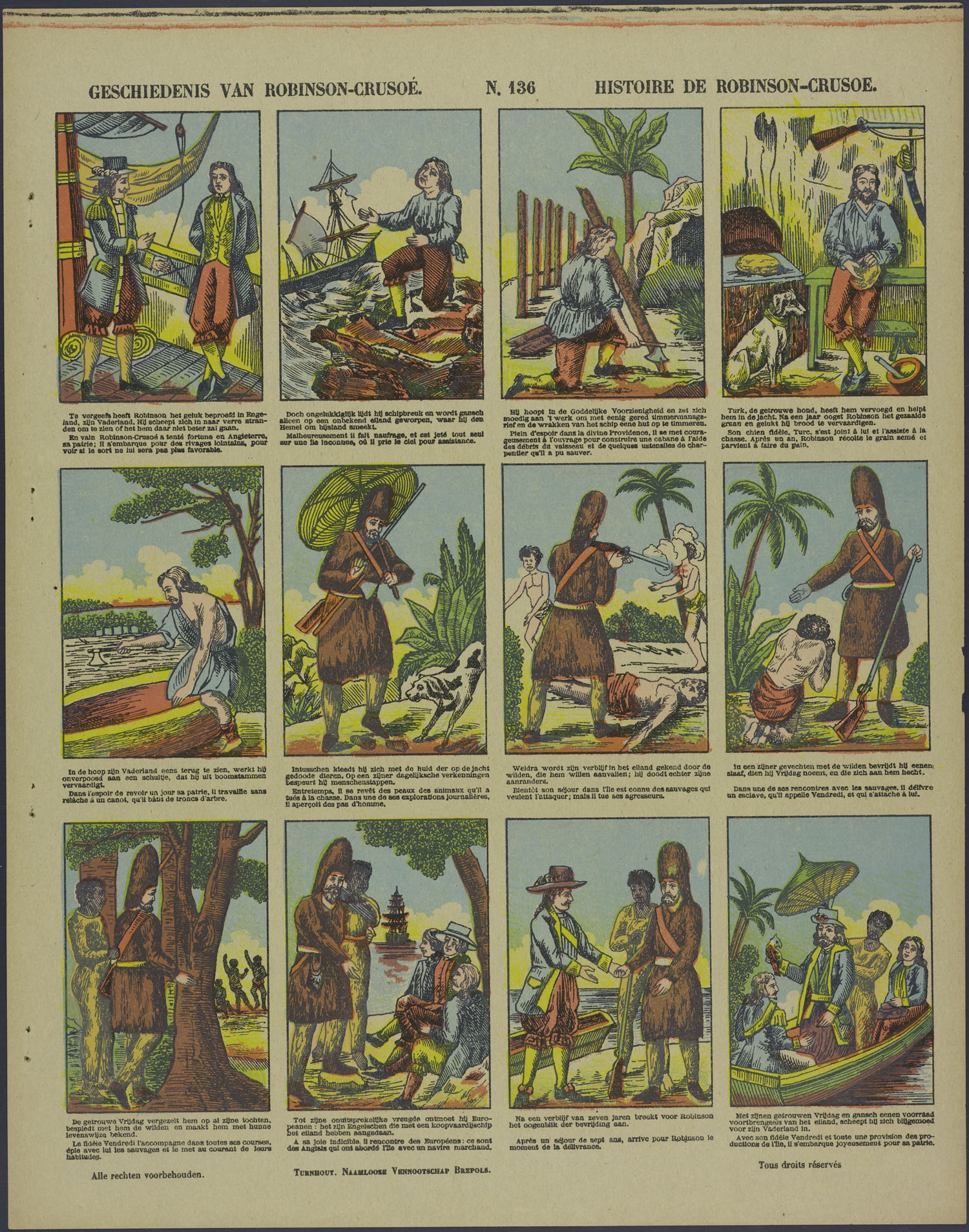 Centsprent met 3 x 4 houtsneden, met afbeeldingen uit de geschiedenis van Robinson Crusoë: vertrek uit Engeland, schipbreuk, hij bouwt een hut, timmert een schuitje, kleedt zich met de huiden van door hem gedode dieren, wordt overvallen door inlanders die hij neerschiet, behalve Vrijdag met wie hij uiteindelijk naar Engeland terugkeert. Bevat rijmende onderschriften in Nederlands en Frans.